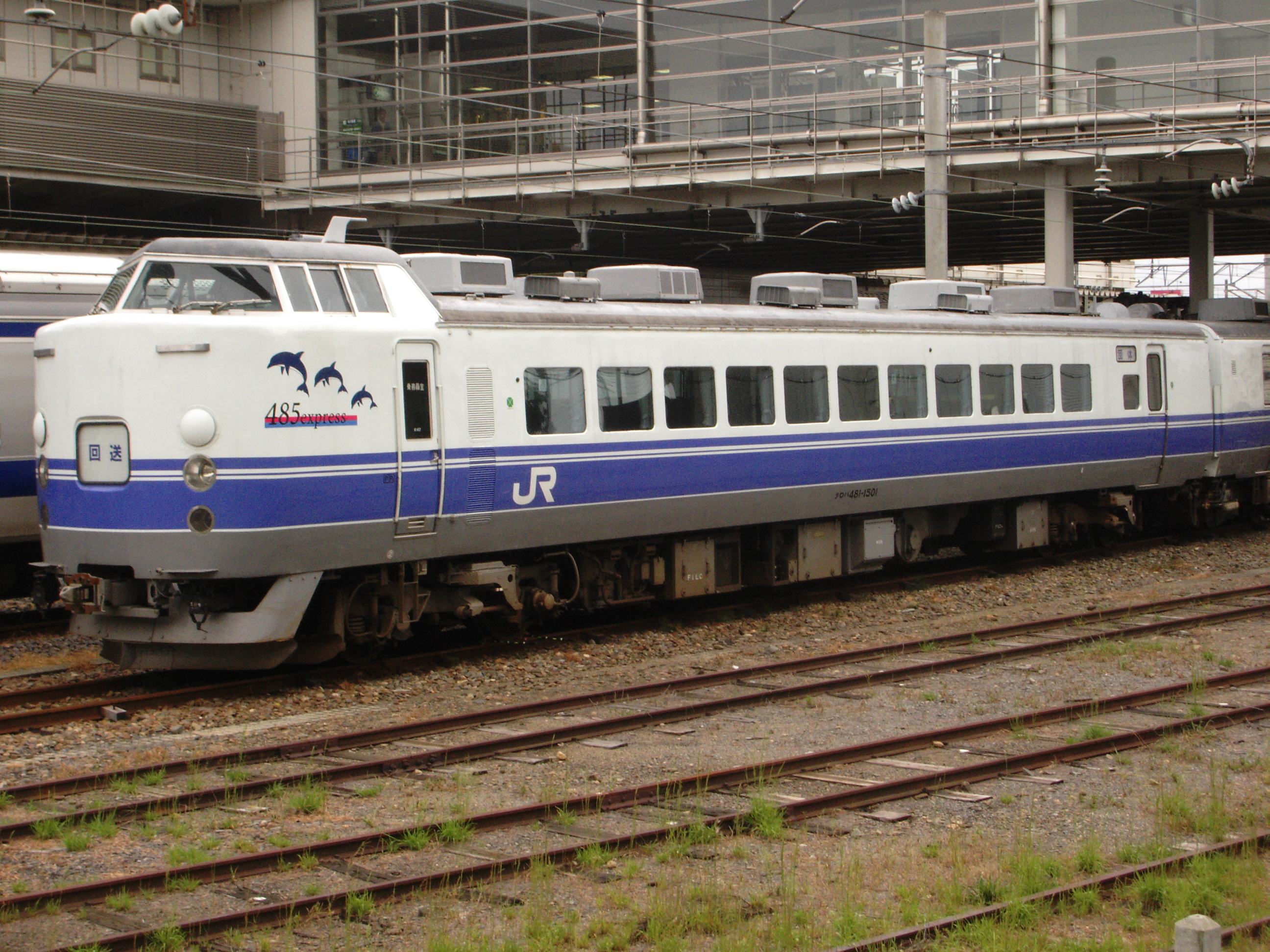 JR東日本485系K40編成クロハ481-1501（勝田駅にて）